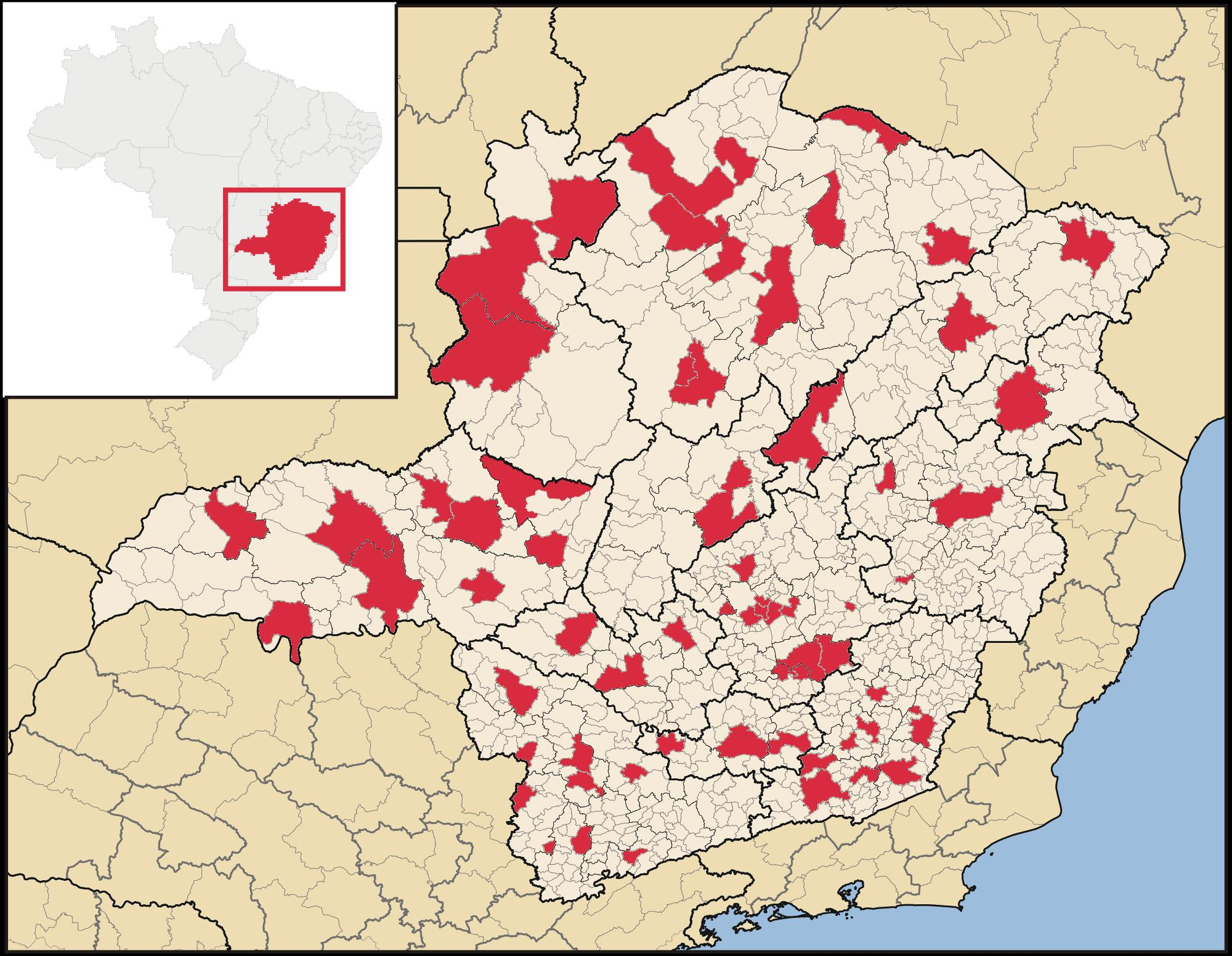 Mapa de Minas Gerais com destaque para os municípios que, até esta data, mantinham campi de universidades federais e estaduais